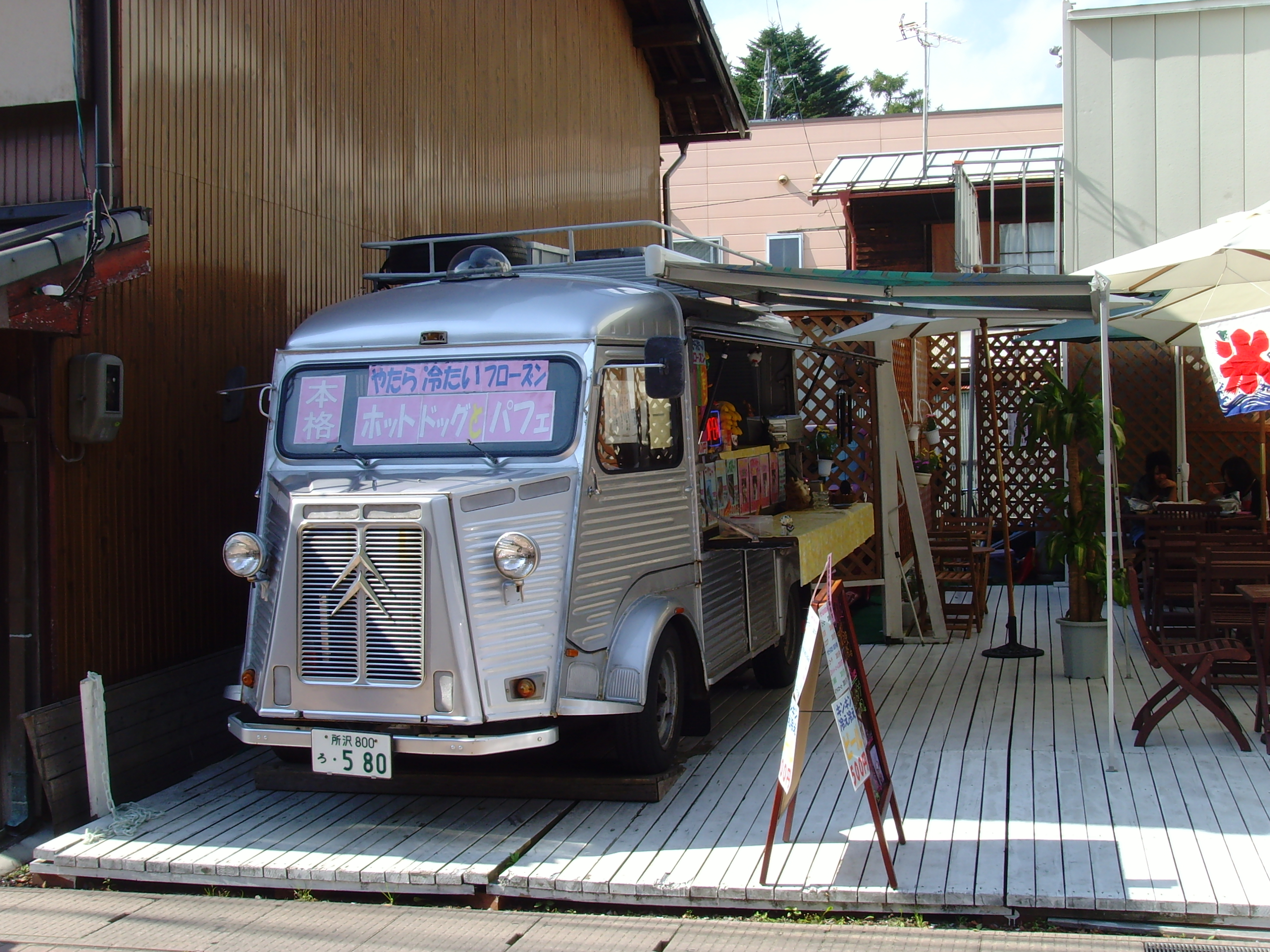 Citroen HY